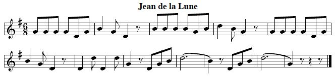 partition de la chanson Jean de la lune